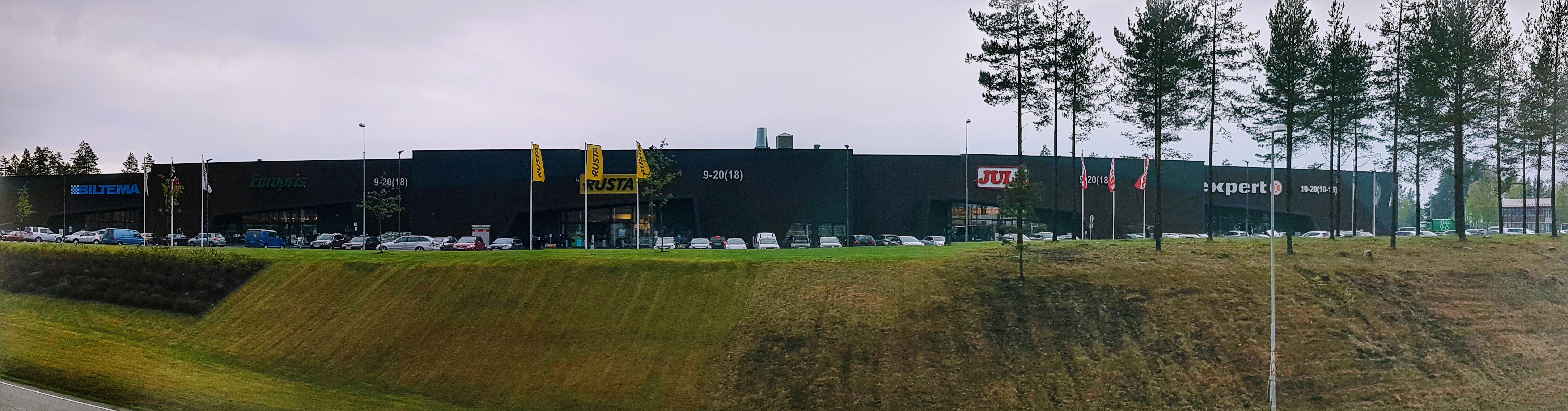 Det nye kjøpesenteret på Hvervenmoen ved Hønefoss (Hvervenmoveien)